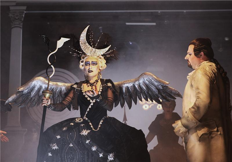 Olga Jelínková jako Královna noci v opeře W. A. Mozarta "Kouzelná flétna". V roli Tamina Jaroslav Březina. Stavovské divadlo Praha, režie Vladimír Morávek, 2015.